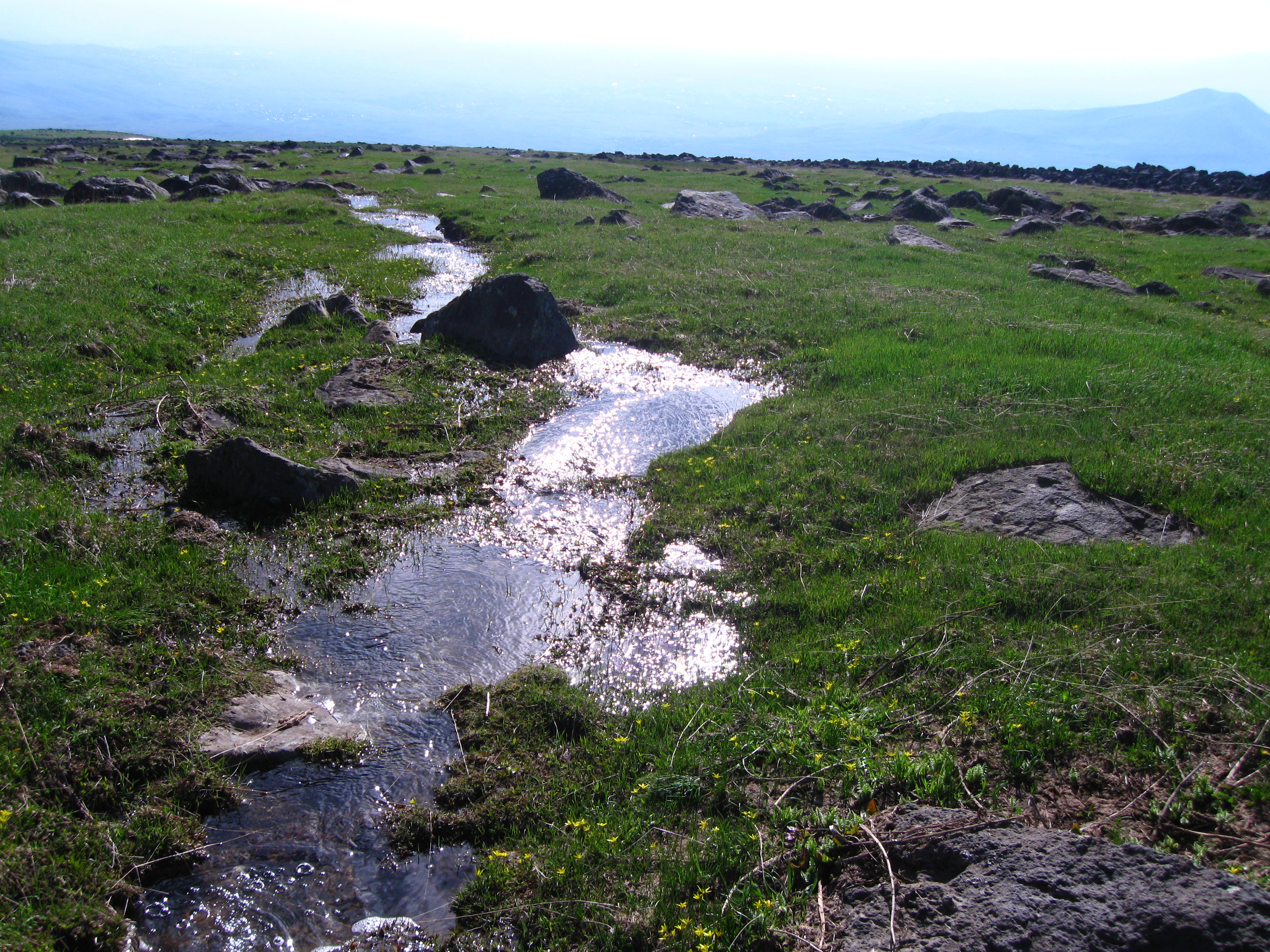 Քառասունակունքի մի վտակը